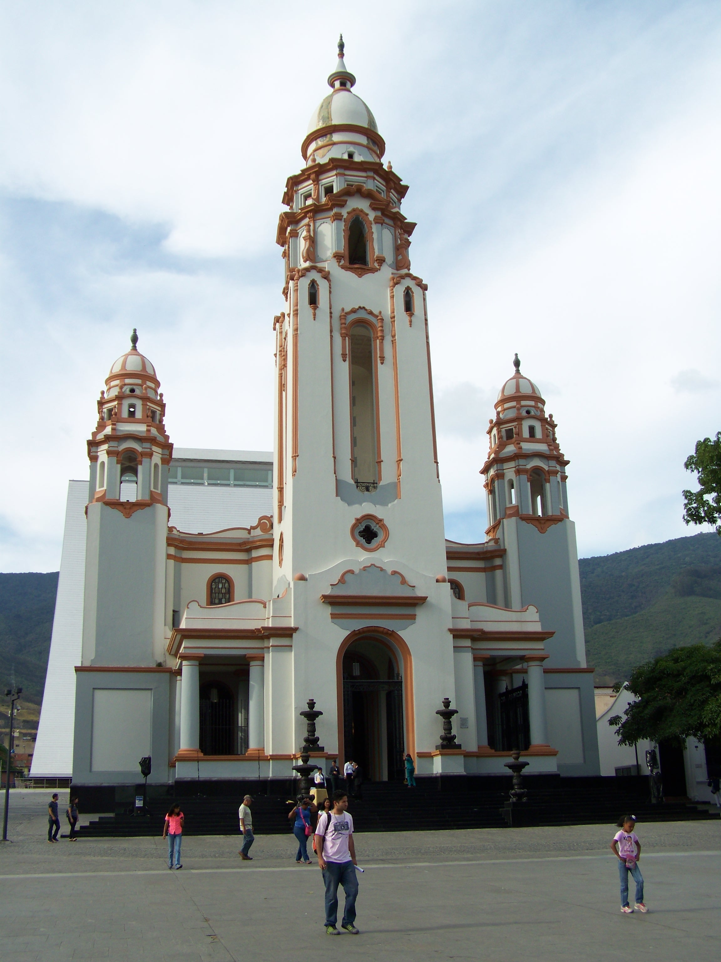 Panteón Nacional Caracas